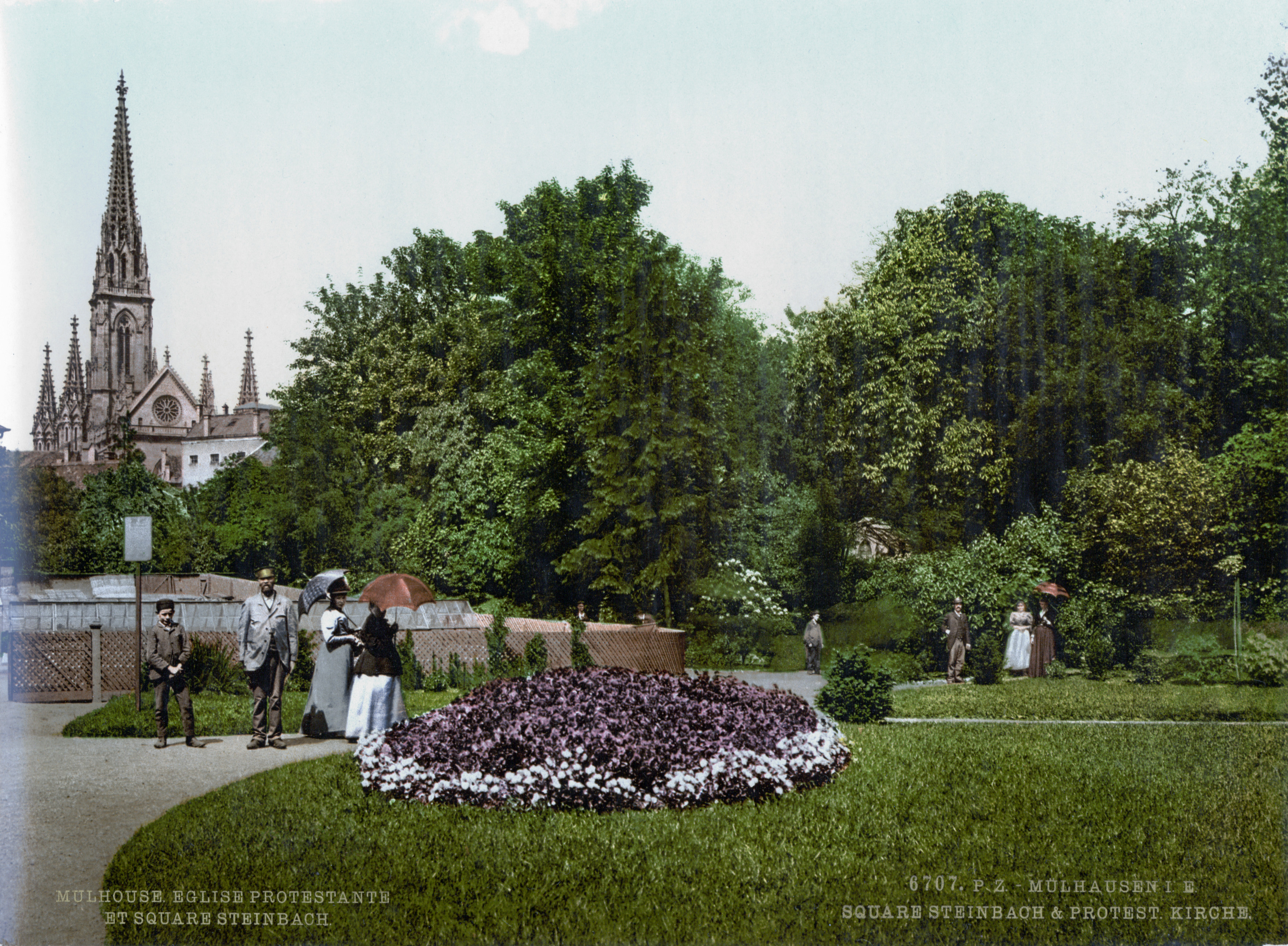 Stephanskirche Steinbachplatz Mülhausen um 1900